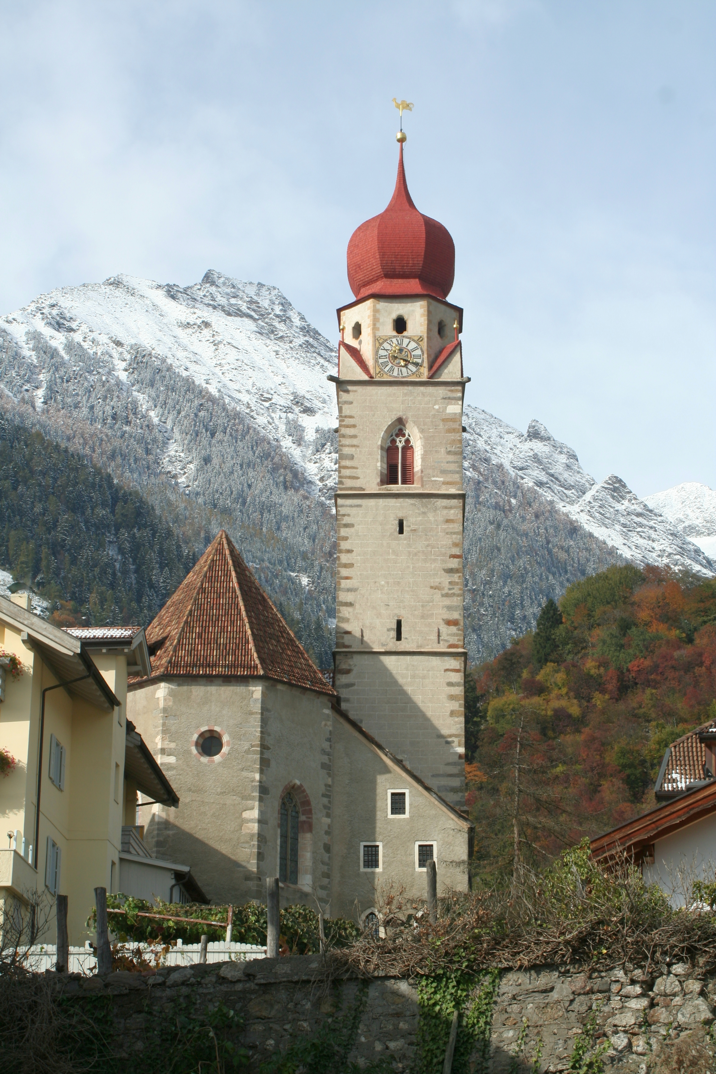 Pfarrkirche St. Peter und Paul in Partschins (Südtirol)